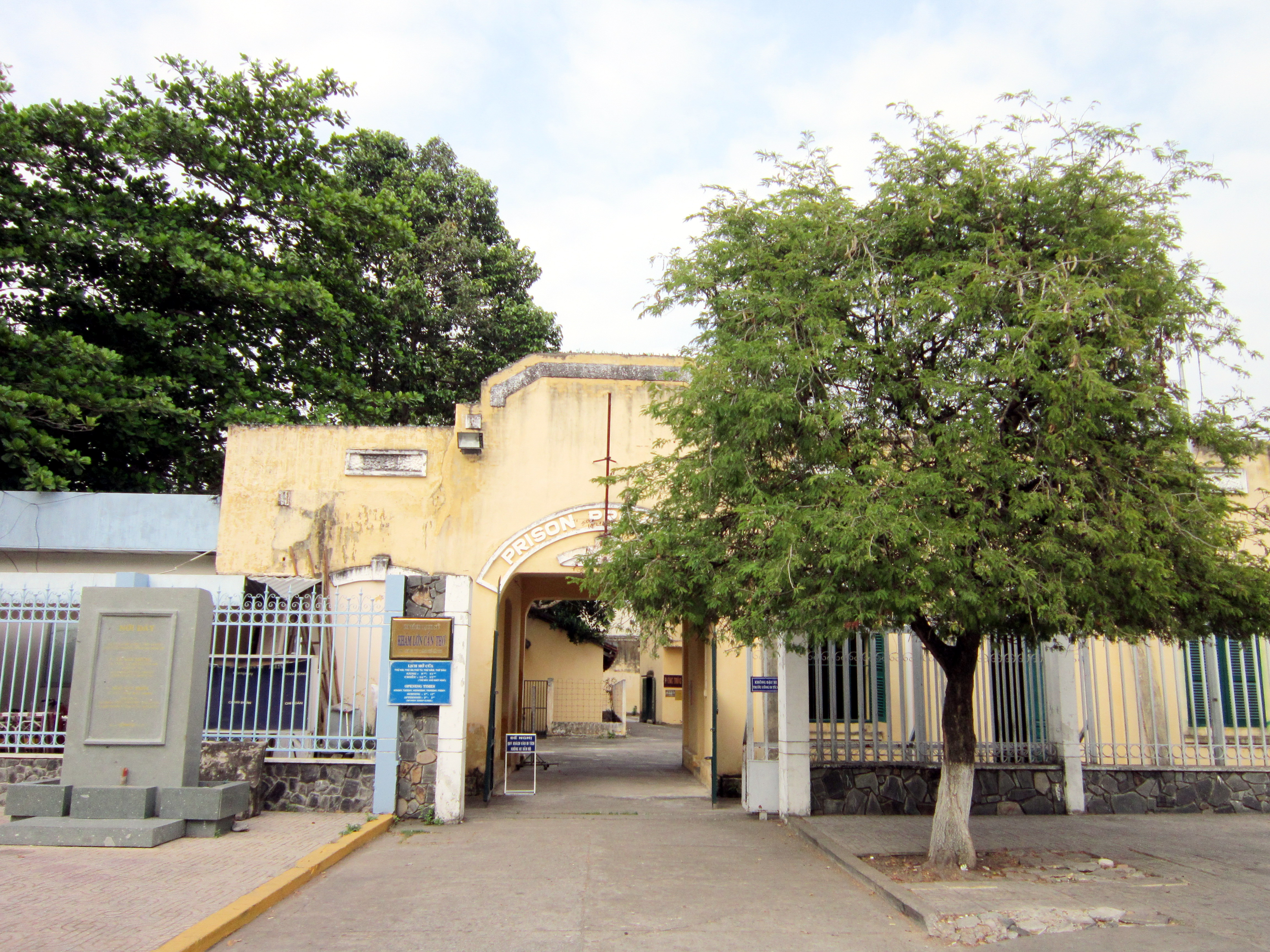 Di tích Khám Lớn Cần Thơ hiện tọa lạc tại số 8, đường Ngô Gia Tự, thành phố Cần Thơ, Việt Nam.